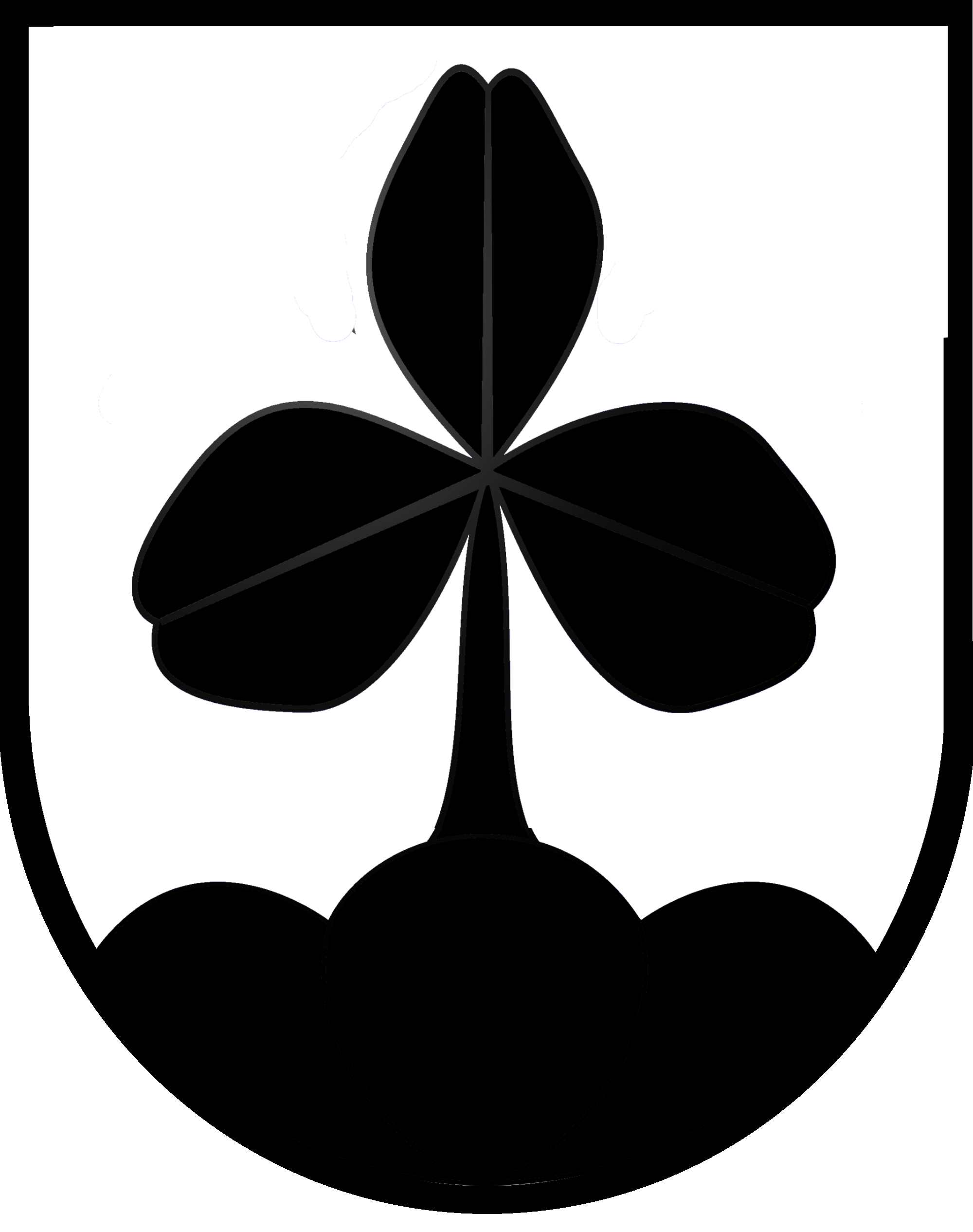 Familienwappen Buol (Kleeblattstengel auf einem Dreiberg)